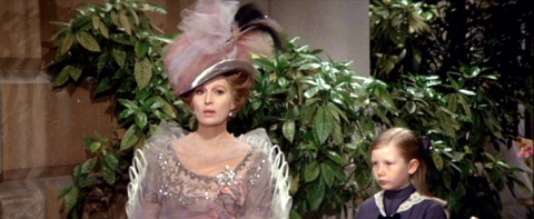 Képkocka a „Halál Velencében” című filmből